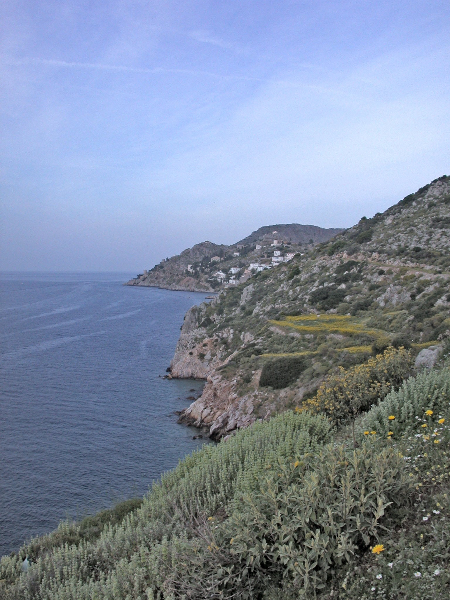 Grecia, isola di Idra, costa prima della spiaggia di Palamidas, presso la città di Idra